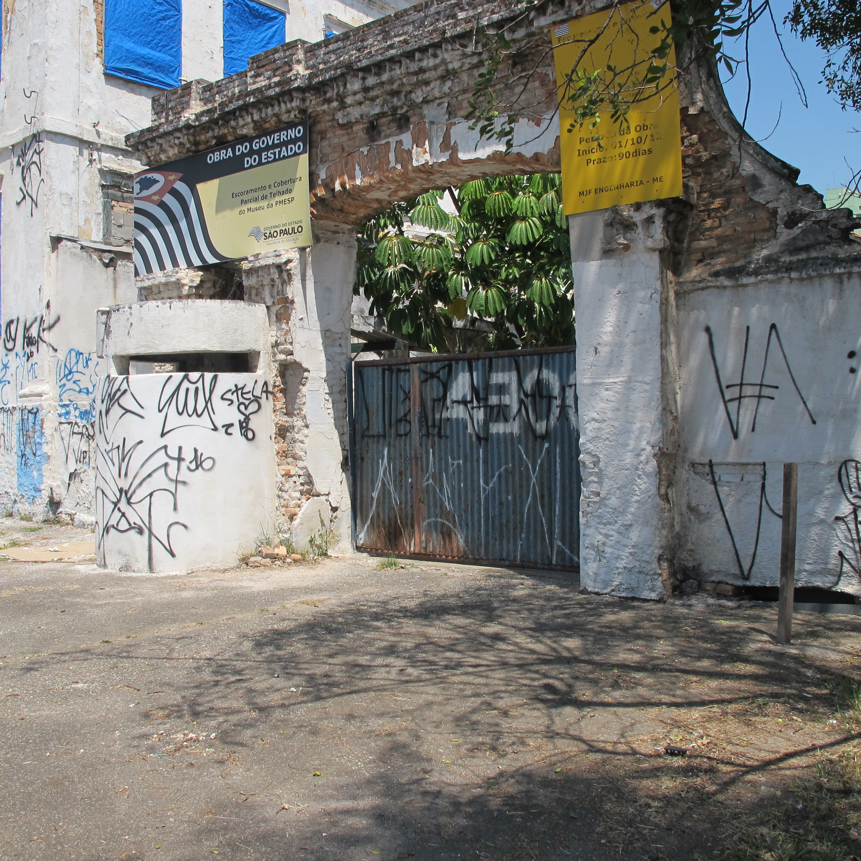 Fachada do Quartel do Segundo Batalhão de Guardas na Avenida do Estado em São Paulo, SP, Brasil.